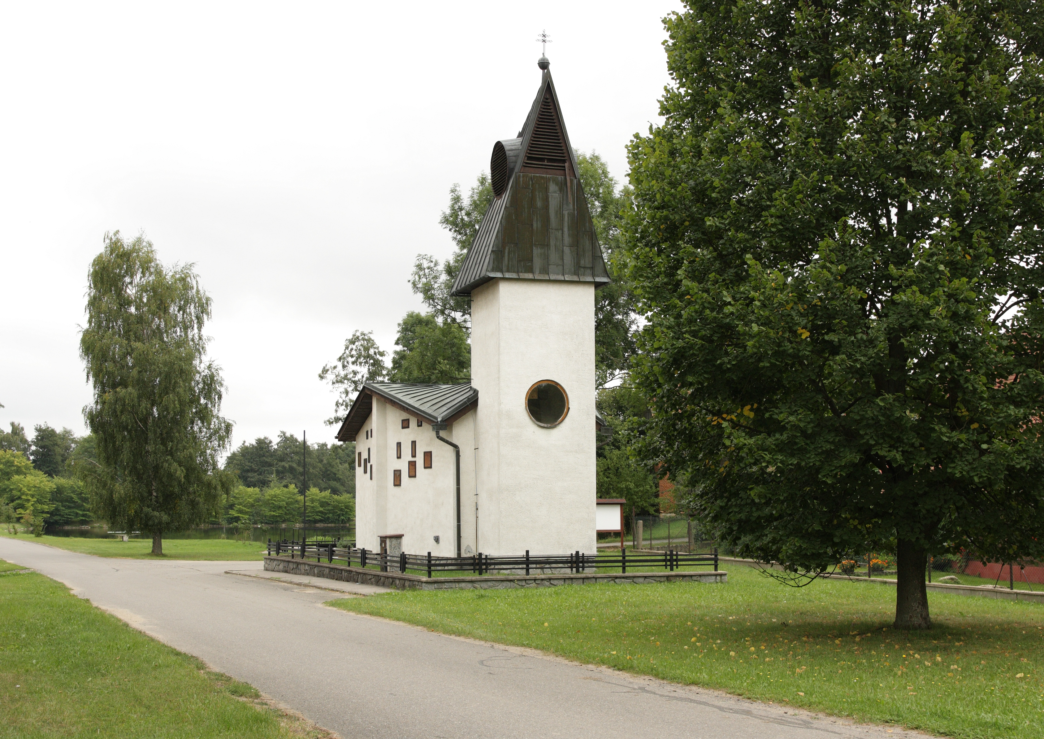 Radkov (okres Žďár nad Sázavou) - kaple sv Anny a Floriána